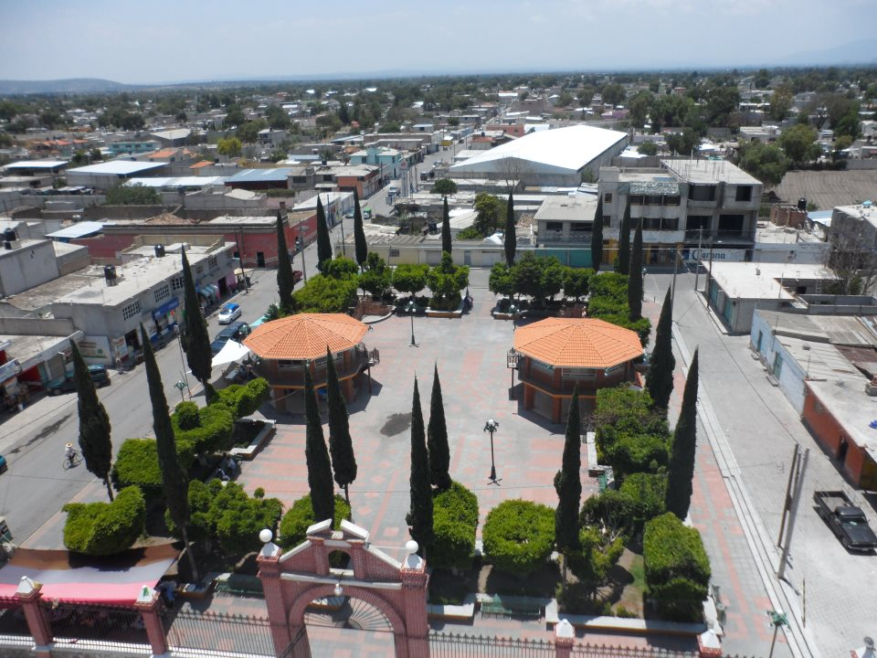 Vista panorámica del Zócalo de Palmarito Tochapán, ubicado en la plaza principal de la población.